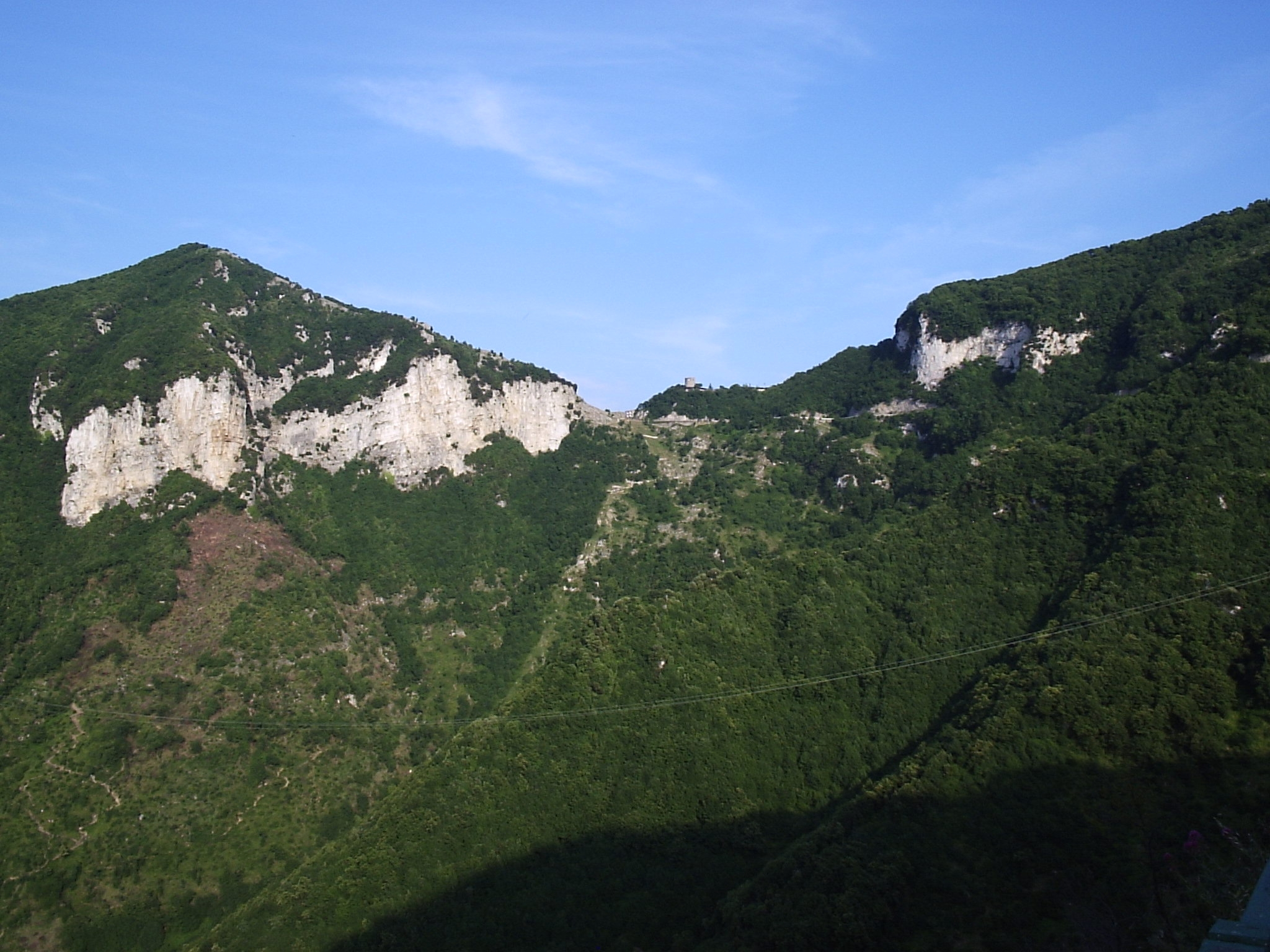 Vista del valico di Chiunzi (catena dei Monti Lattari), che mette in comunicazione la valle del fiume Sarno o Agro nocerino-sarnese con la Costiera amalfitana in provincia di Salerno.